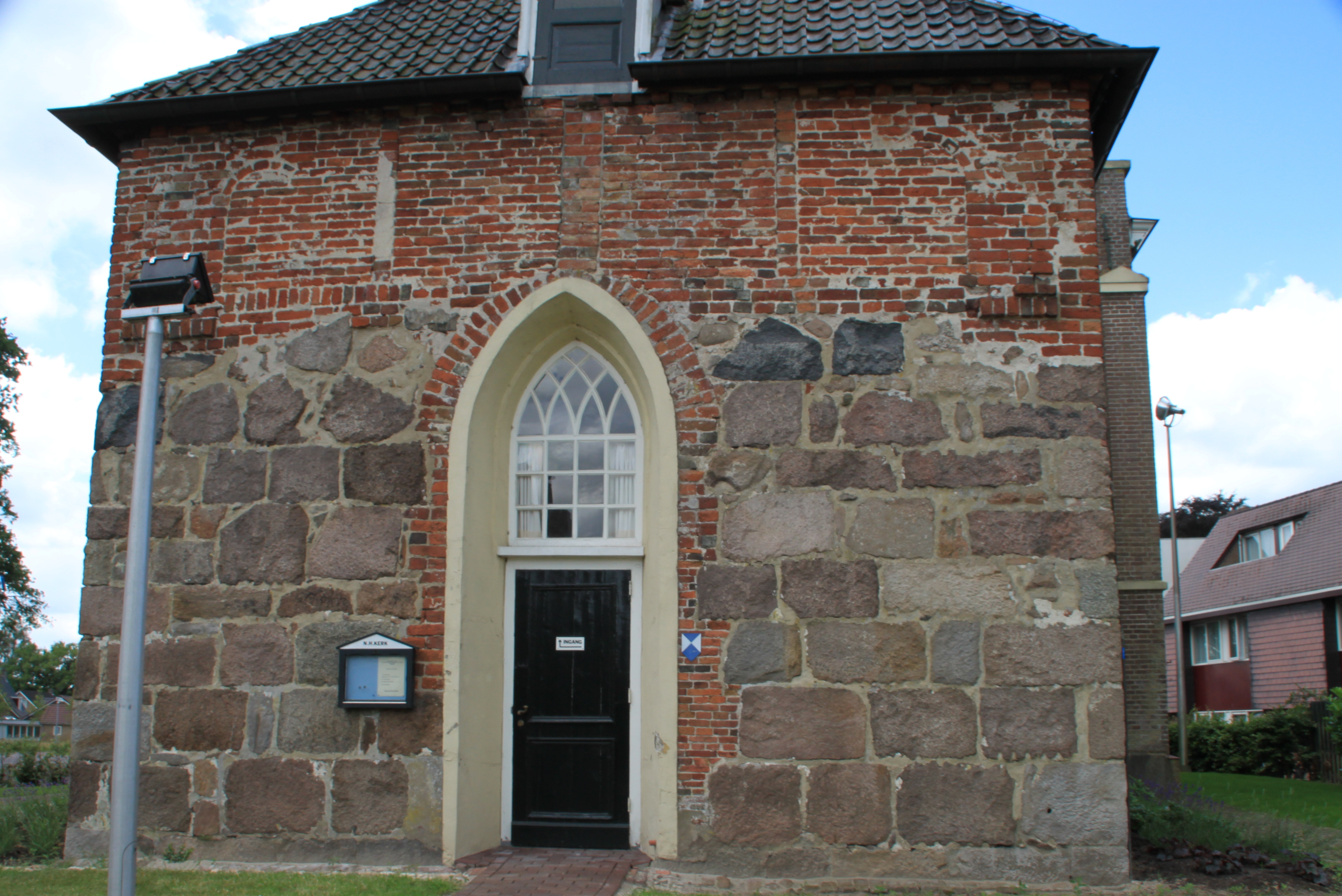 Odoorn - Hervormde kerk 2014